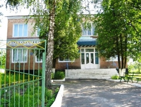 Bilyj Dim.jpg: Білий Дім у Плужному